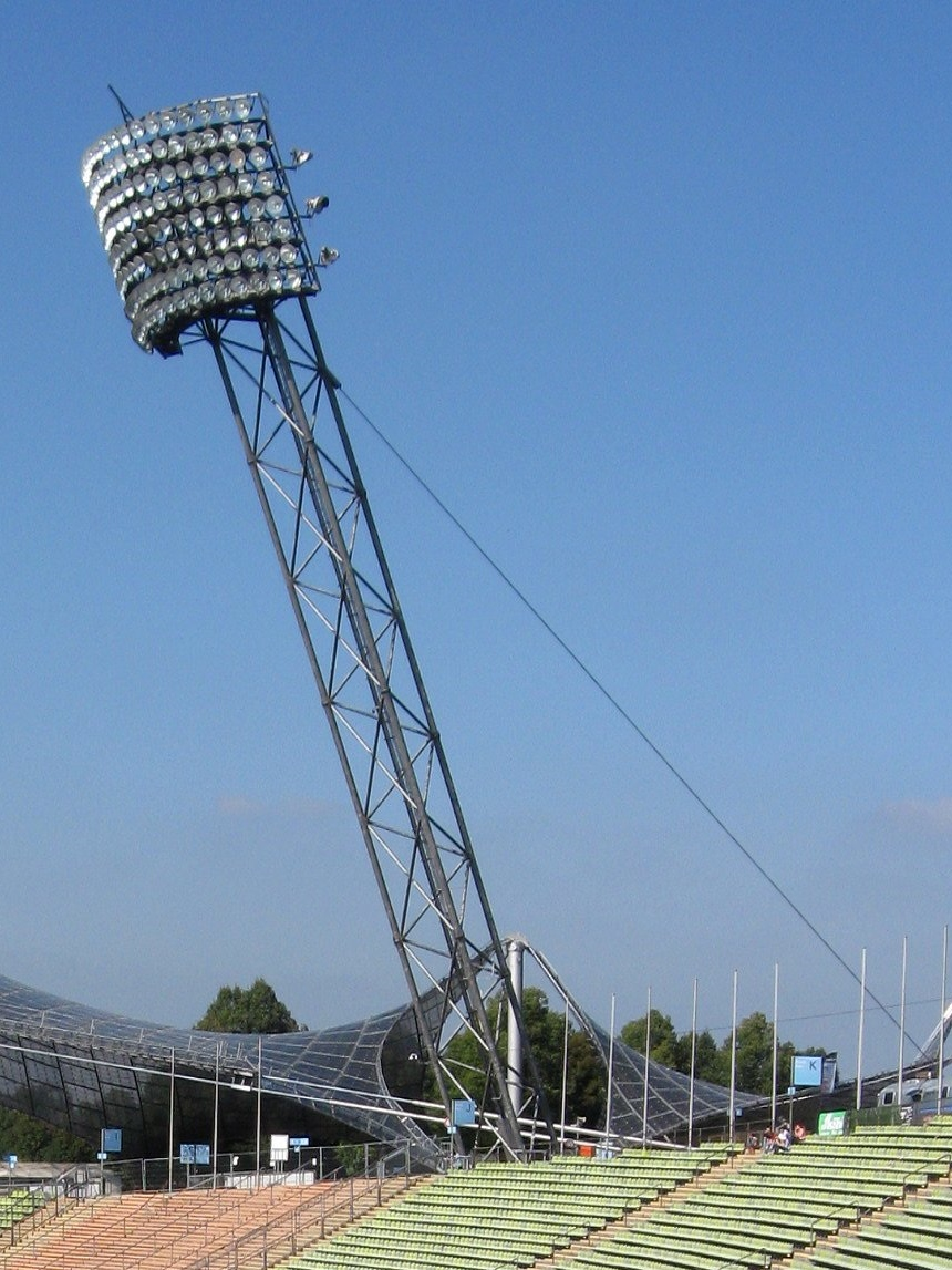 Ein Flutlicht im Olympiastadion München